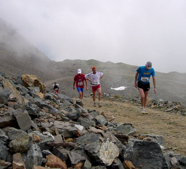 “Steinwüste” bei Kilometer 39 beim Graubünden-Marathon 2005.